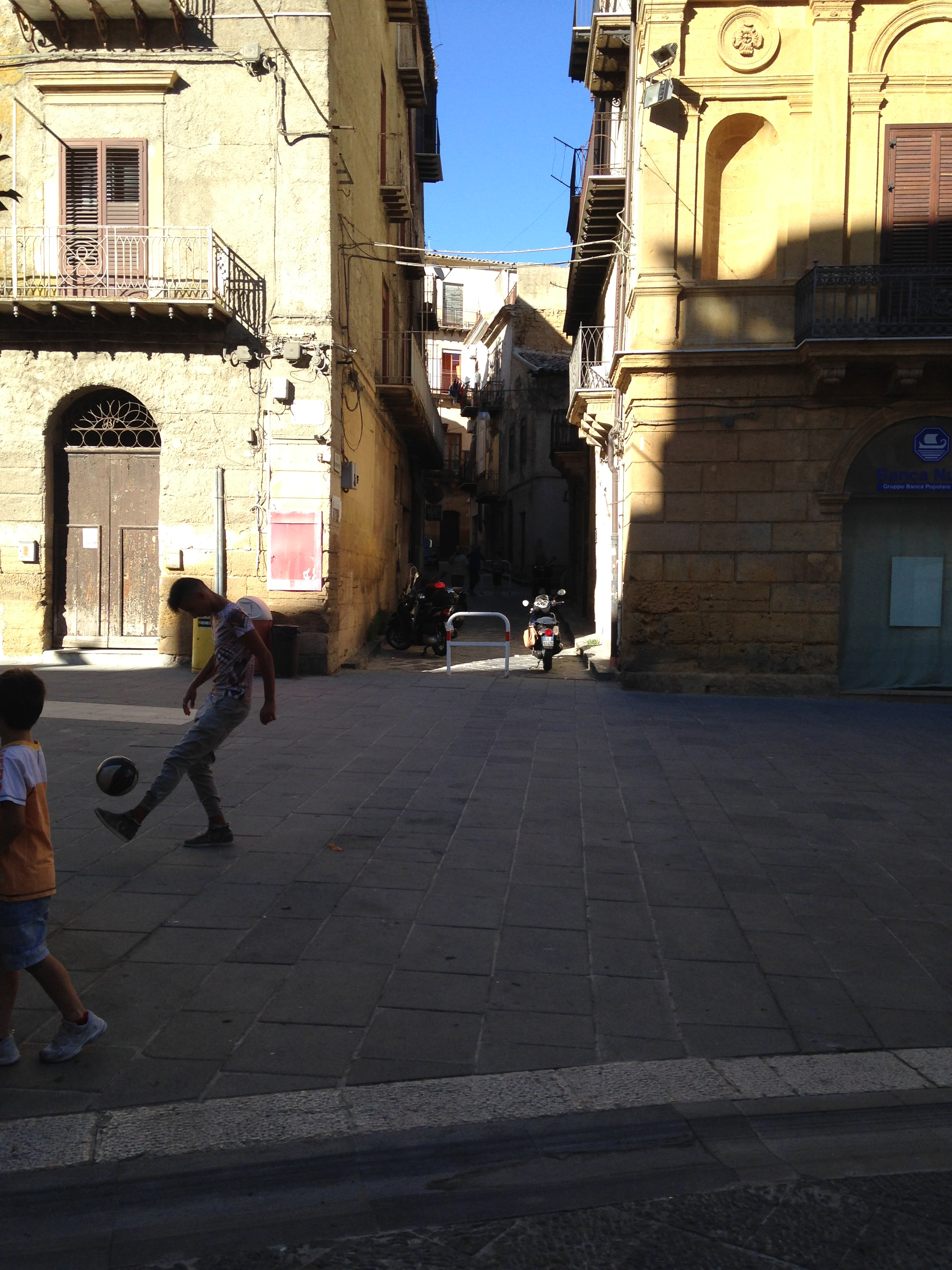 Via Aristuto vista da via G.Gattuso